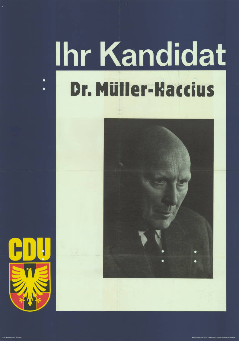 Ihr Kandidat Dr. Müller-Haccius CDU Abbildung: Porträtfoto Plakatart: Kandidaten-/Personenplakat mit Porträt Auftraggeber: CDU Niedersachsen, Hannover Drucker_Druckart_Druckort: Repro-Druck, Schmiden bei Stuttgart Objekt-Signatur: 10-008 : 222 Bestand: Landtagswahlplakate Niedersachsen (10-008) GliederungBestand10-18: Landtagswahlplakate Niedersachsen (10-008) » CDU Lizenz: KAS/ACDP 10-008 : 222 CC-BY-SA 3.0 DE